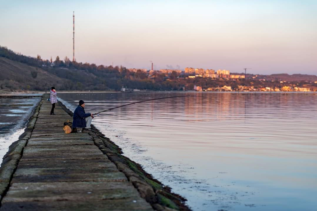 район Аршинцево (Керчь)